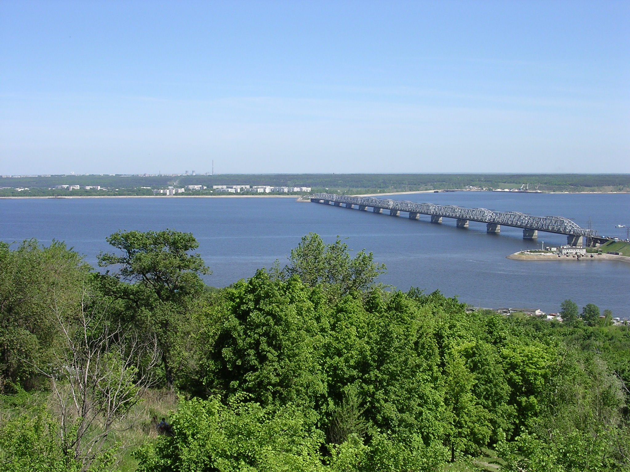 Volga near Ulyanovsk